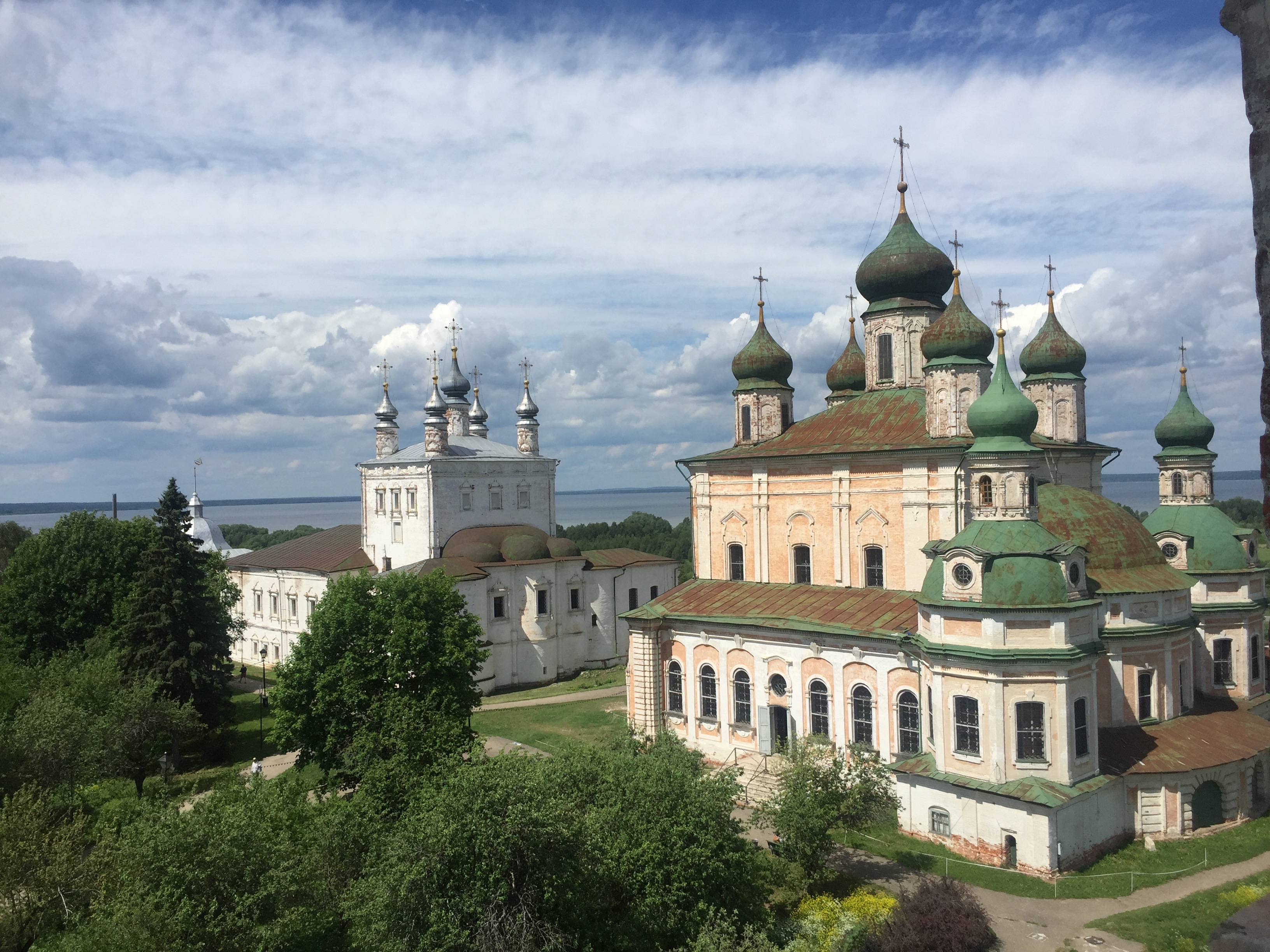 Территория Горицкого Успенского монастыря